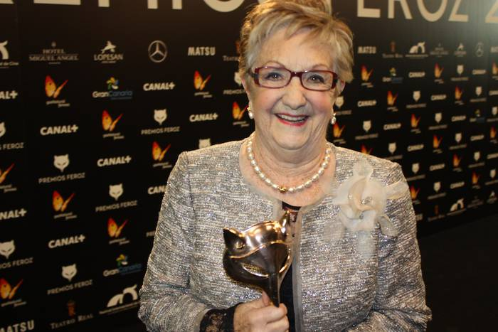 Itziar Aizpuru aktorea 2015ean